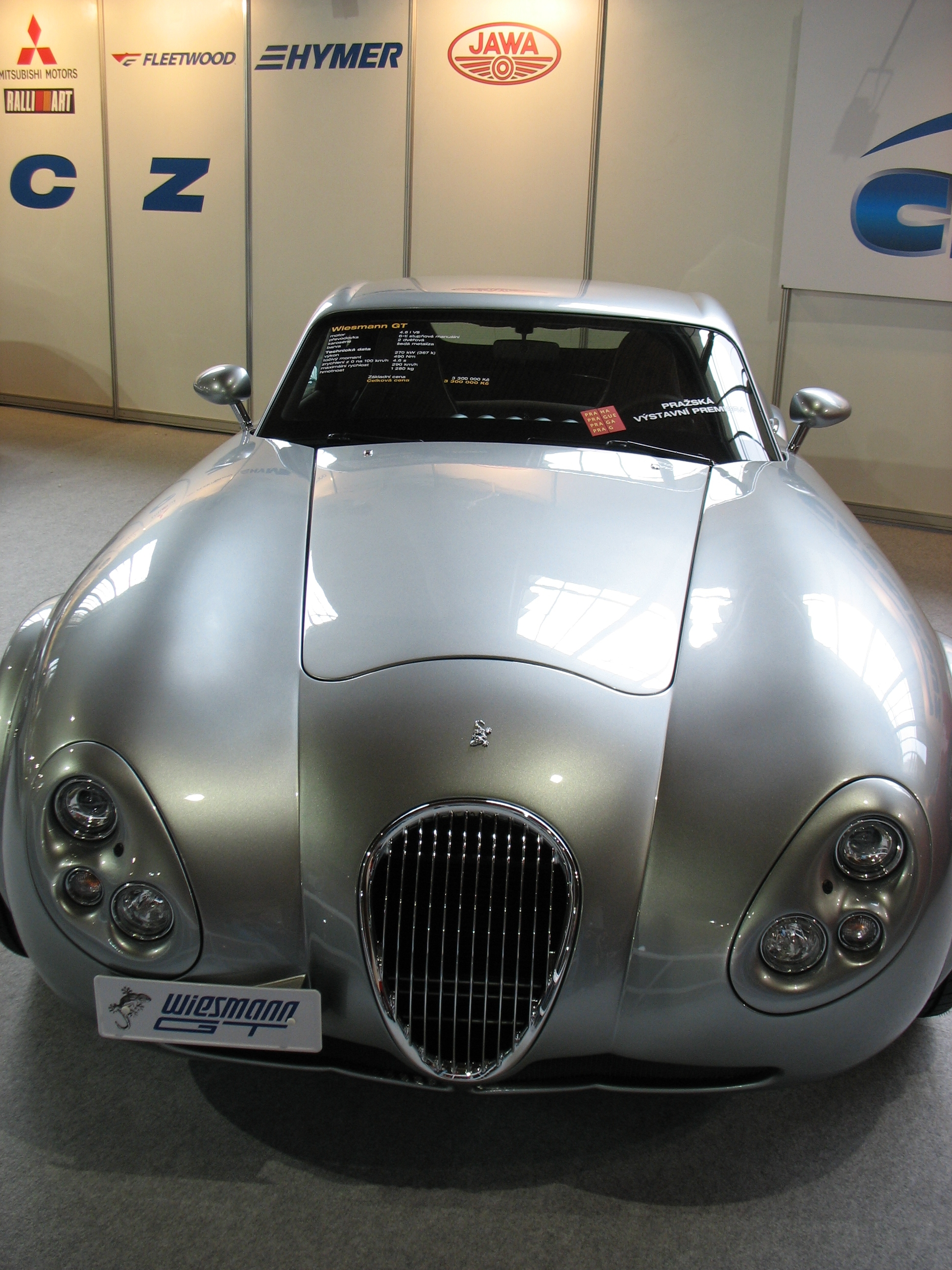 Wiesmann GT (4.8 l, 270 kW)